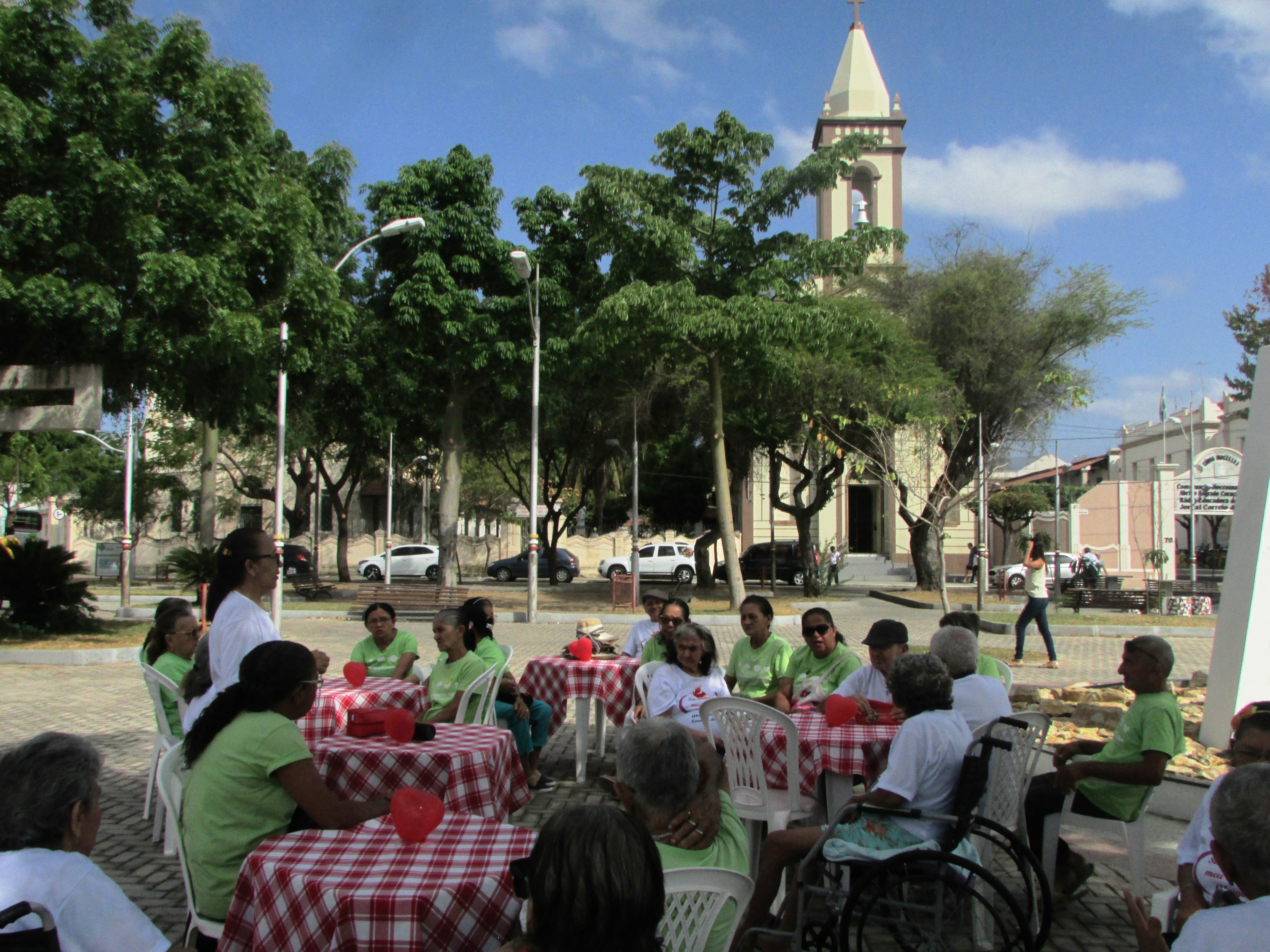 Idosos em frente ao Abrigo